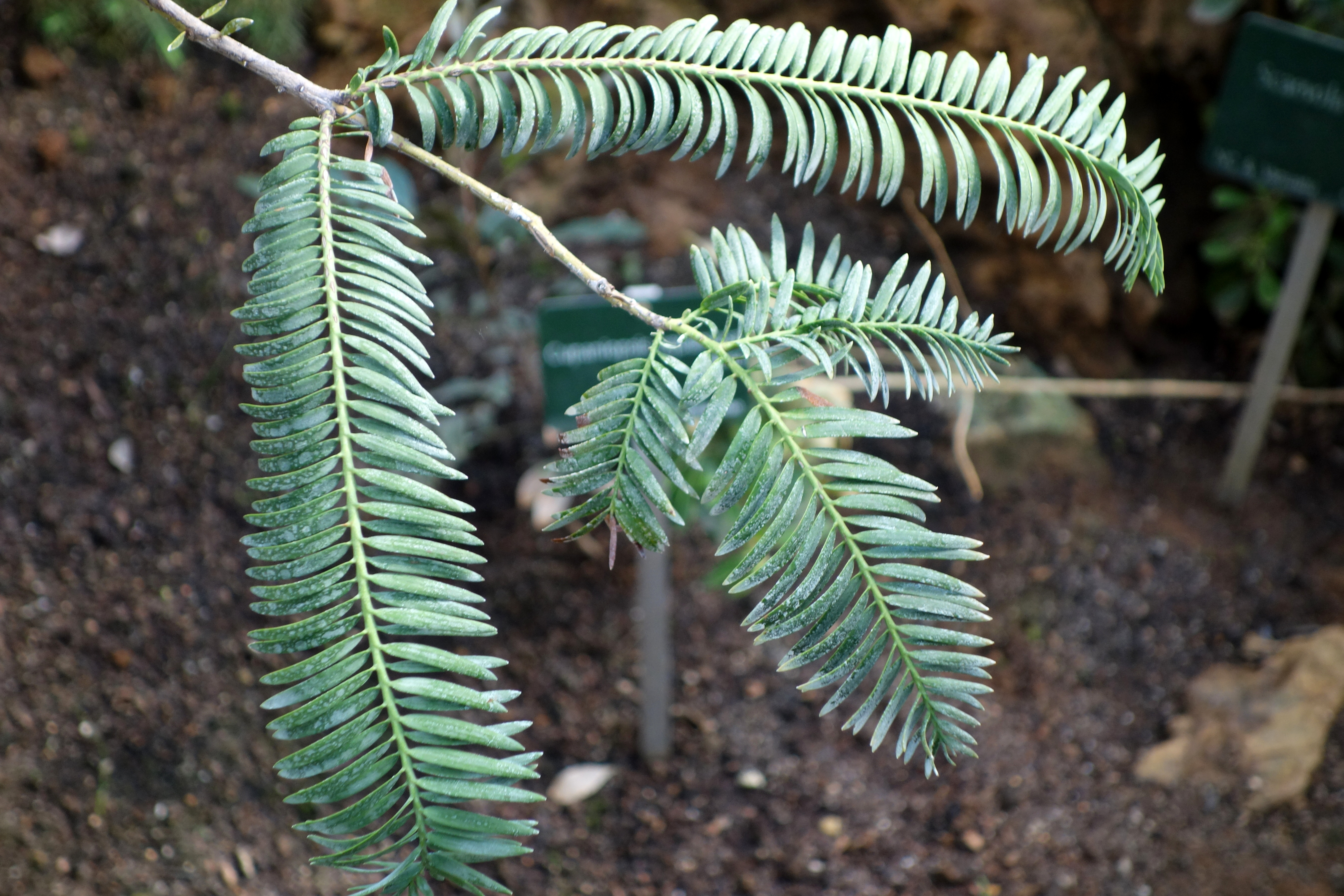 Bois bouchon (Conifère)